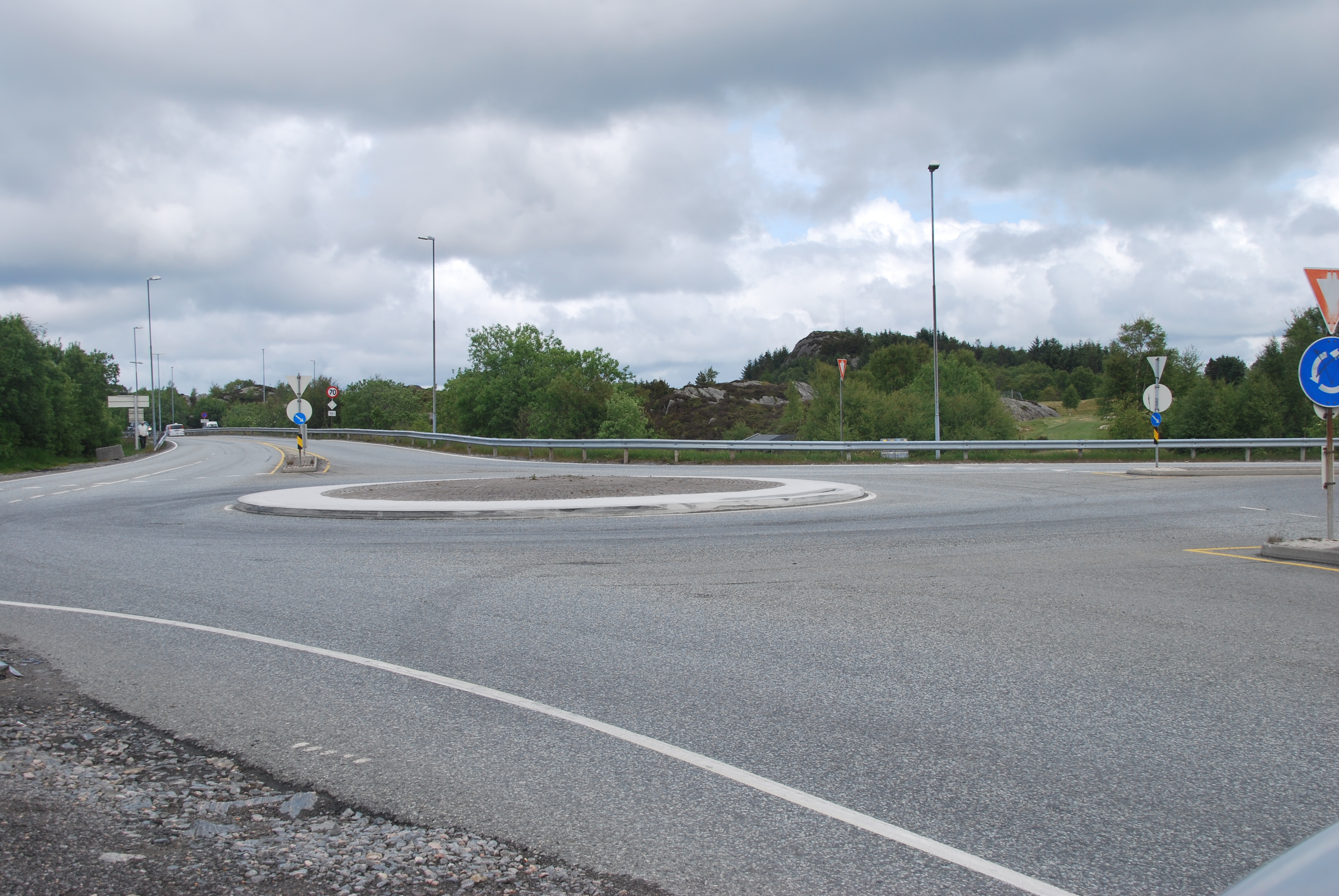 Kolltveitrundkjøring